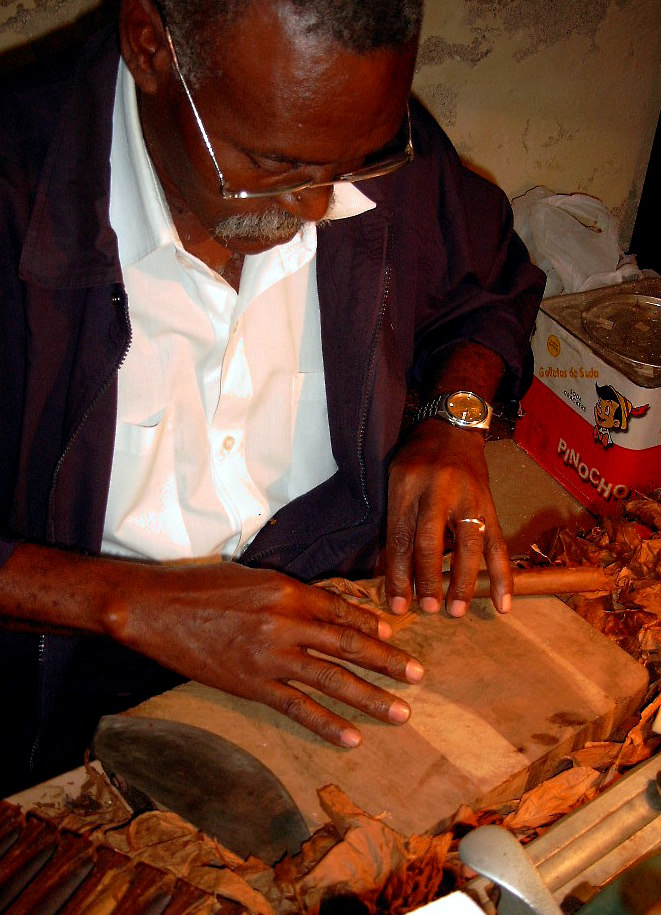 Zigarrendreher, Cuba